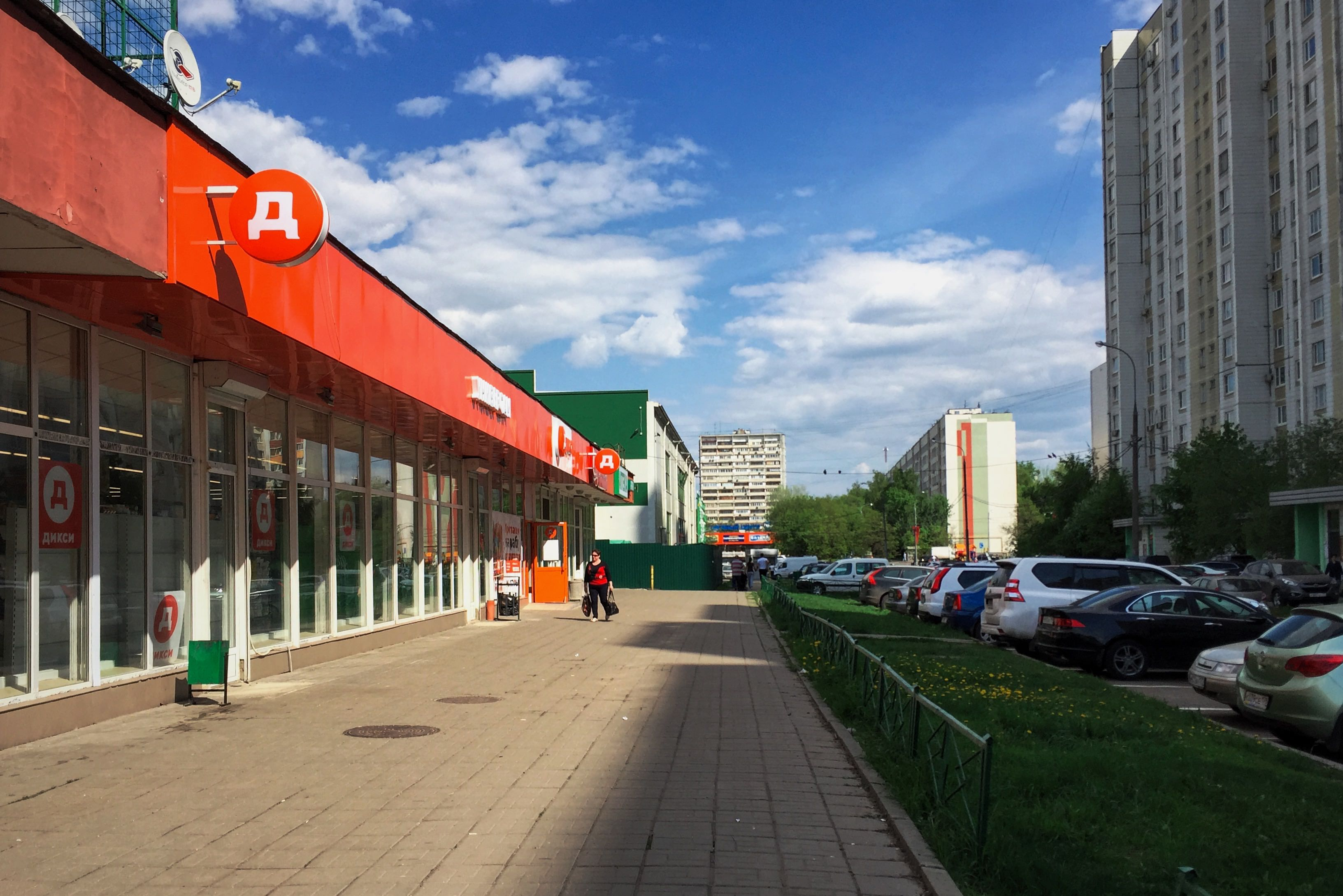 Вешняковская улица 12 - районные "торговые ряды". Фактически - особый торговый бульвар без названия в формате стрип-молл.